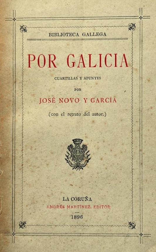 Por Galicia, cuartillas y apuntes